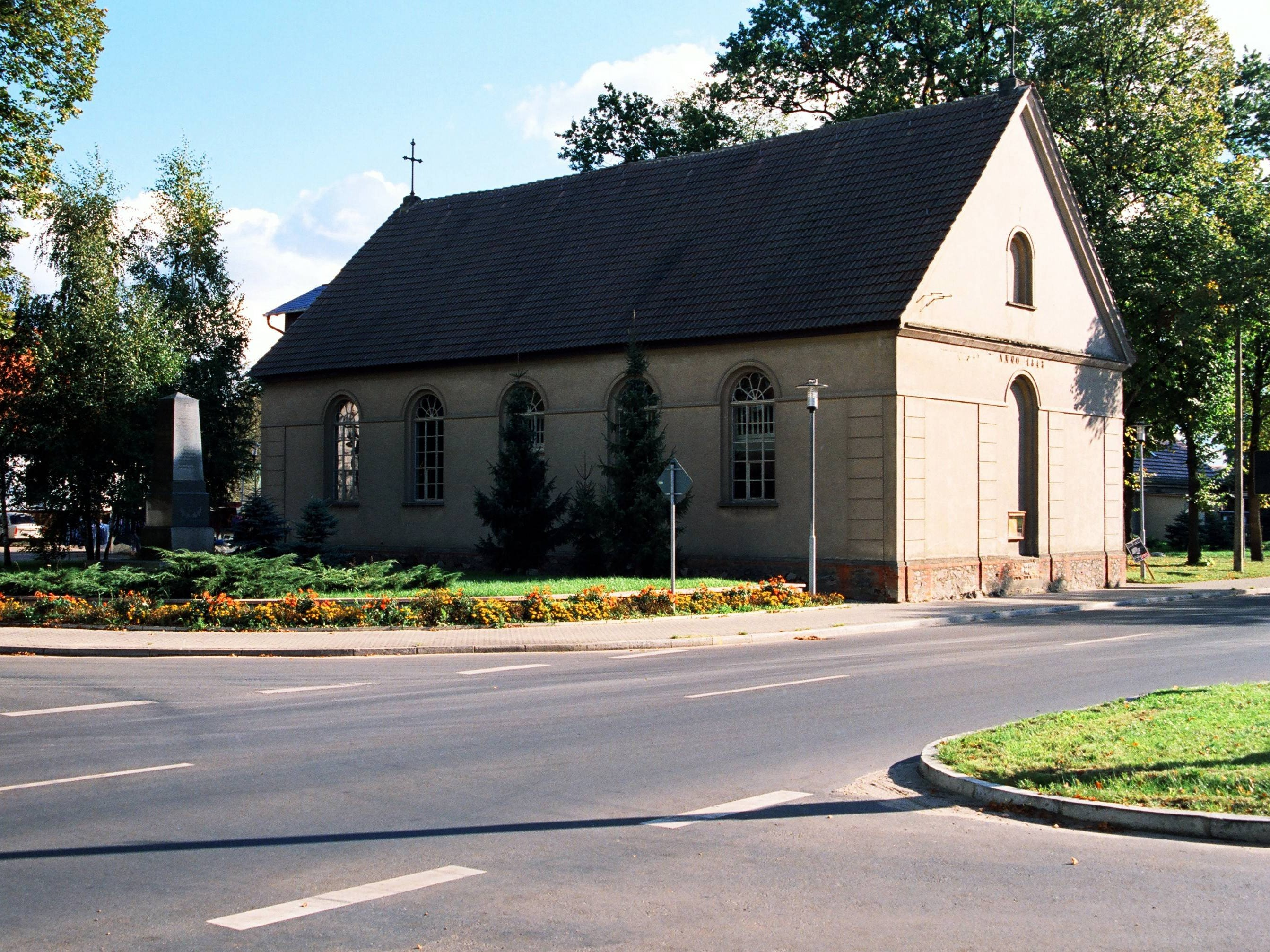 Kirche von Schönwalde (Barnim), Gemeinde Wandlitz, Land Brandenburg, Deutschland